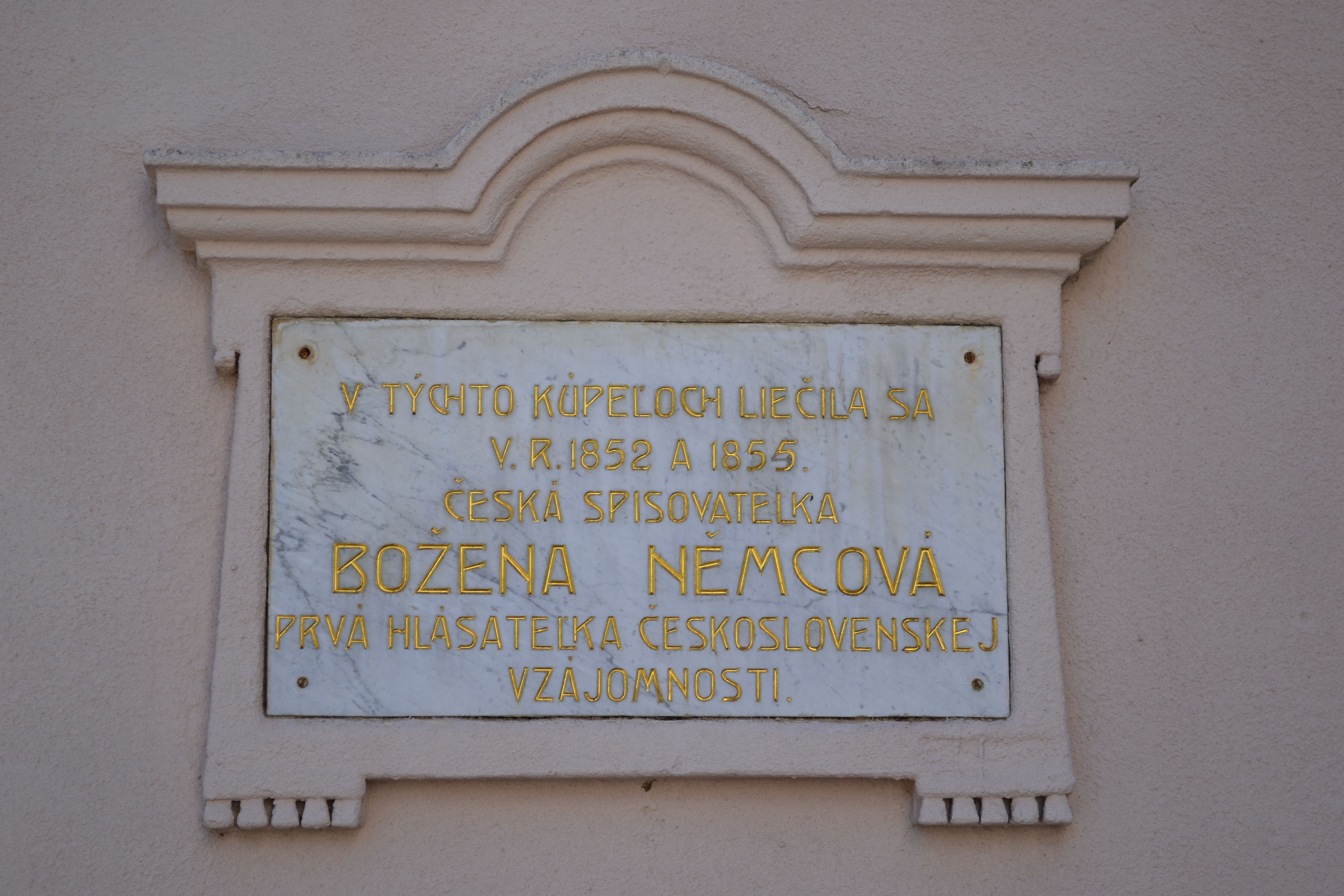 Pamätná tabuľa Boženy Němcovej v kúpeľoch Sliač.